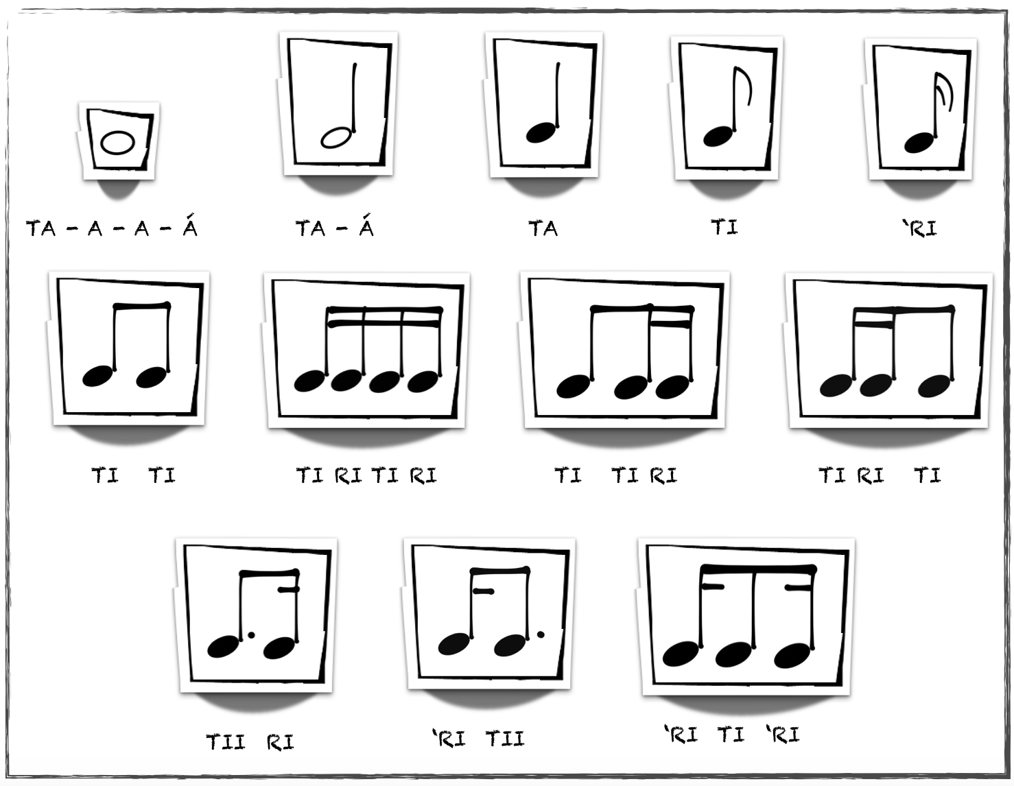 Síl·labes rítmiques que s'utilitzen per a l'aprenentatge de les figures musicals en el mètode musical educatiu Kodály